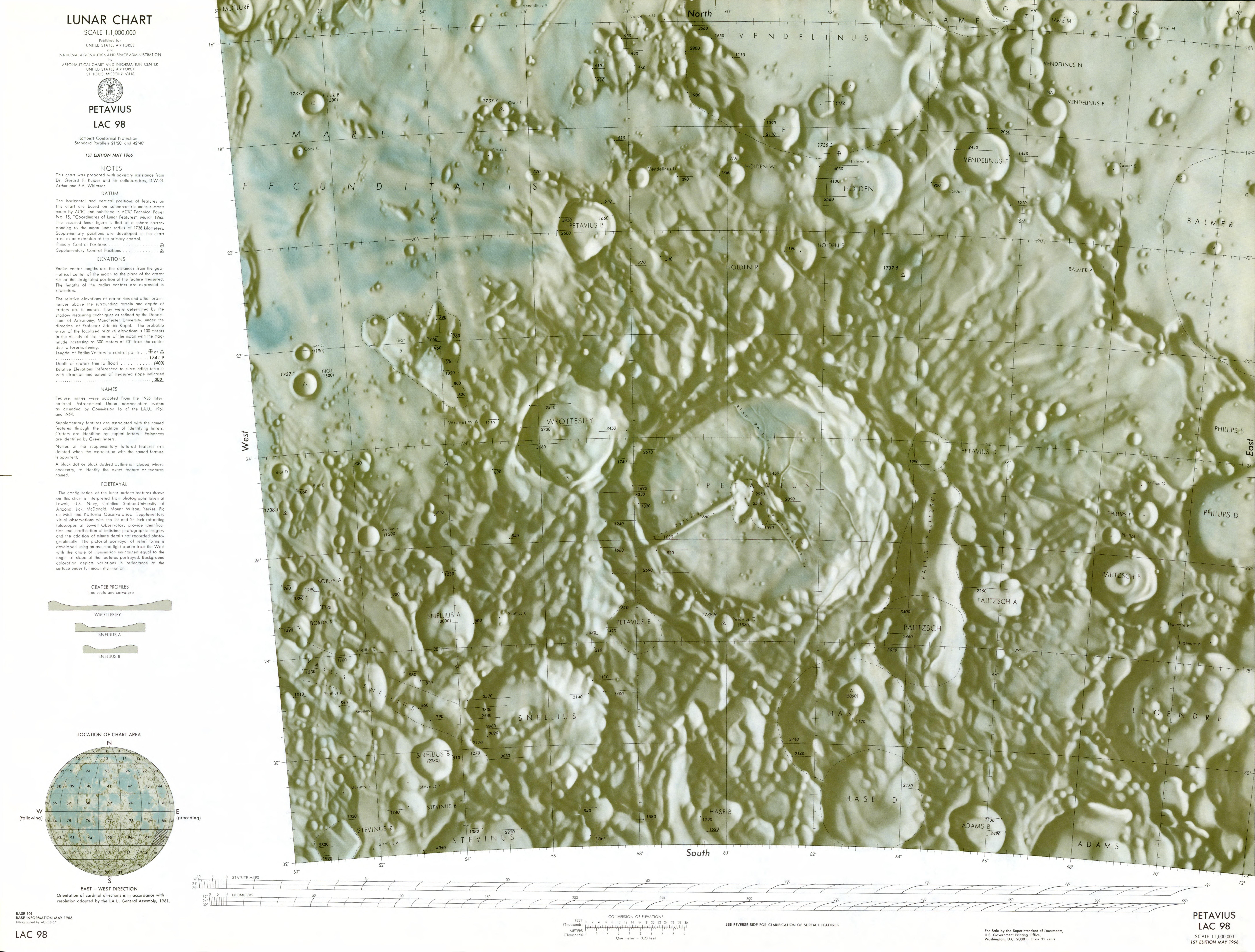 1:000 000 scale lunar chart - Petavius (LAC 98)